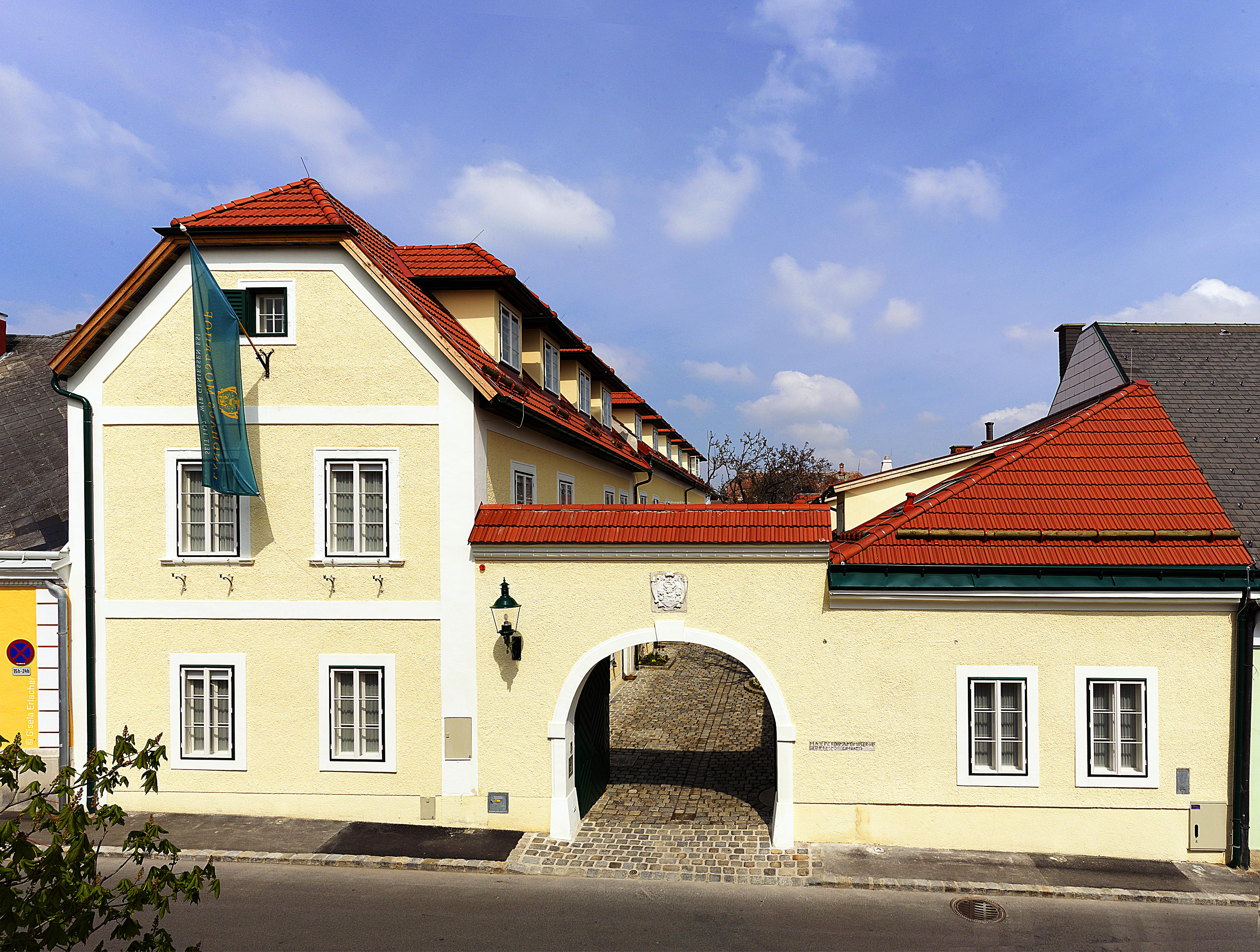 Ehemaliger Moserhof